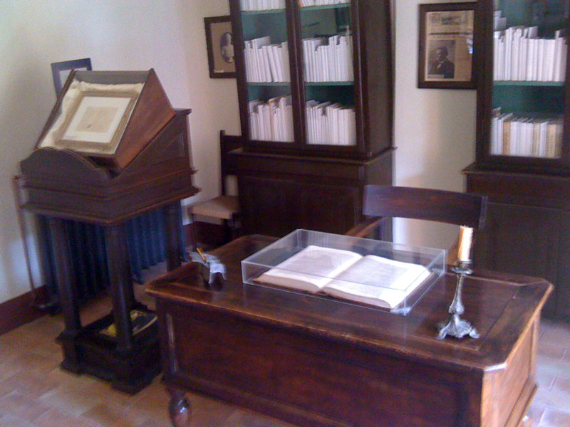 Autore: Nicholas Montemaggi Descrizione: Lo studio di Giovanni Pascoli all'interno di Casa Pascoli Licenza: Creative Commons Attribuzione 2.0